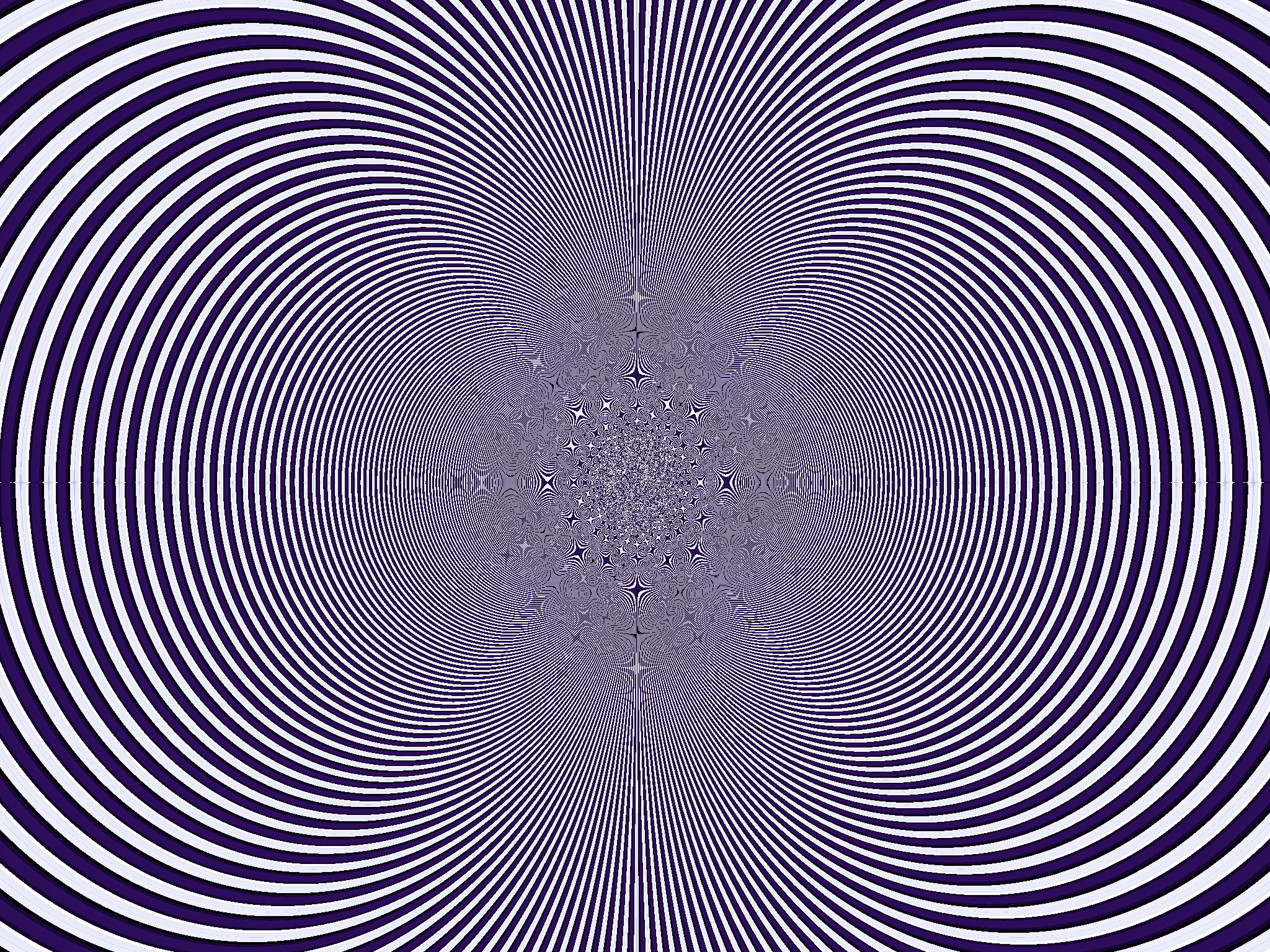 Moire